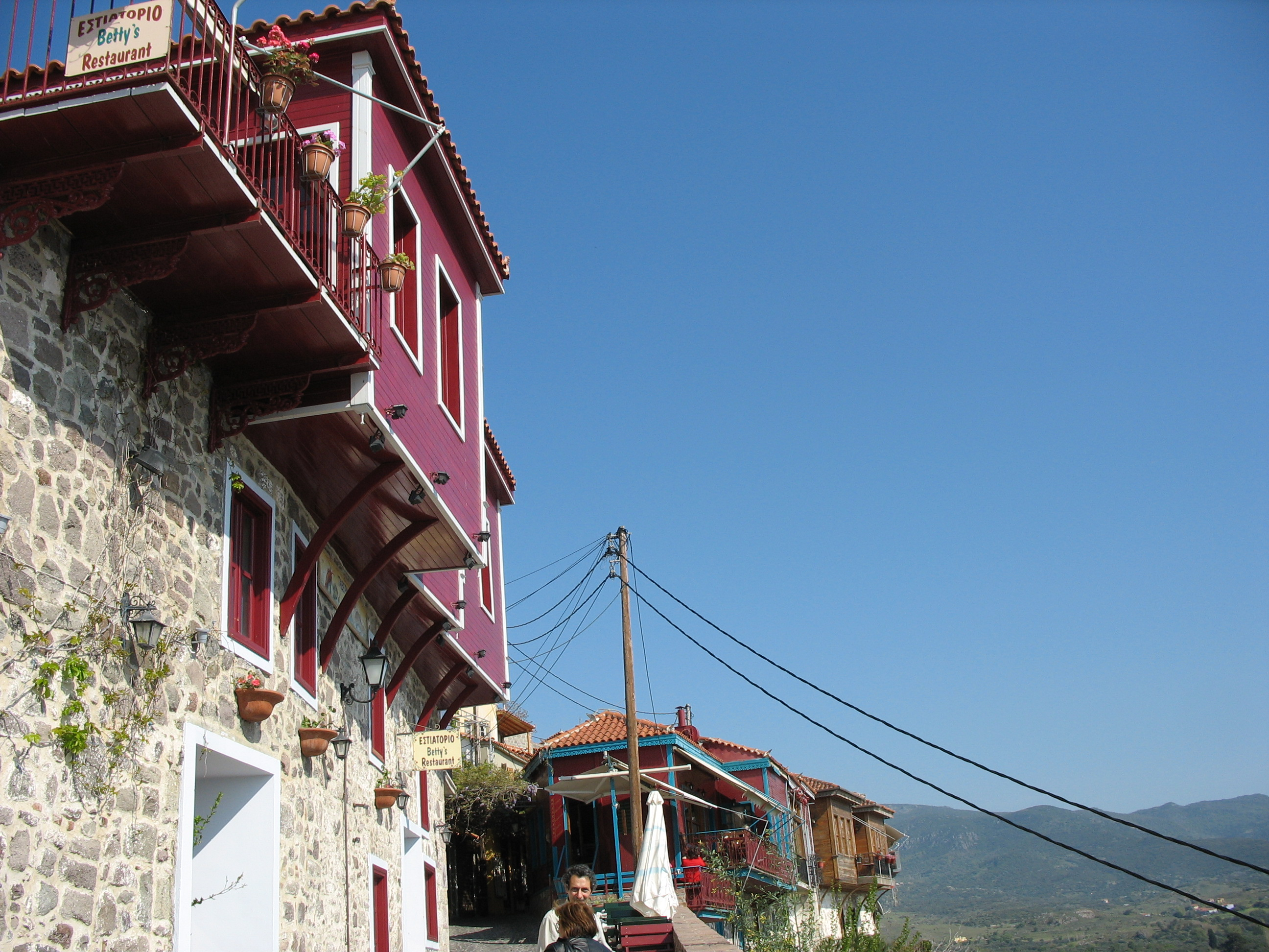 Moluvos